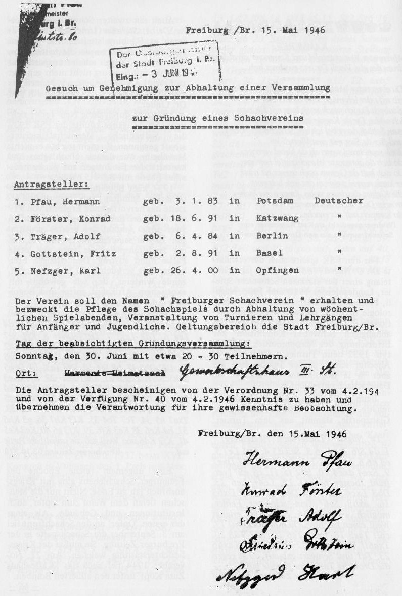 Gesuch um Genehmigung zur Abhaltung einer Versammlung zur Gründung eines Schachvereins, Freiburg am 15. Mai 1946.